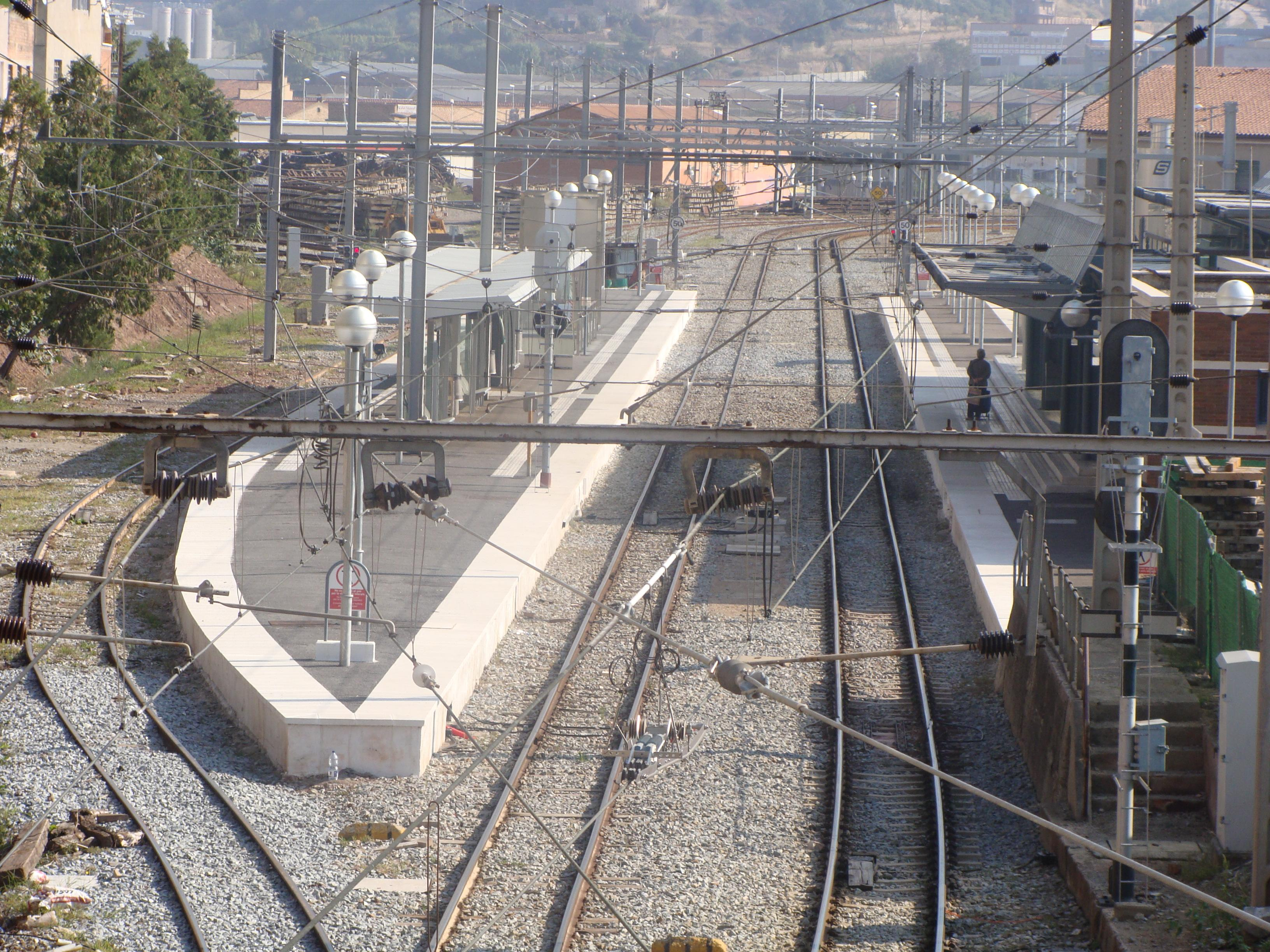 Fotografia feta des de la carretera Santpedor. Fotografía hecha desde la calle Santpedor.